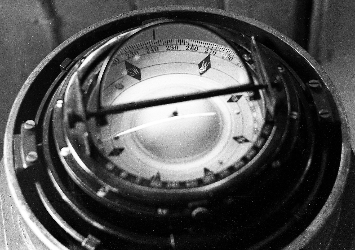 Laevakompass 1970